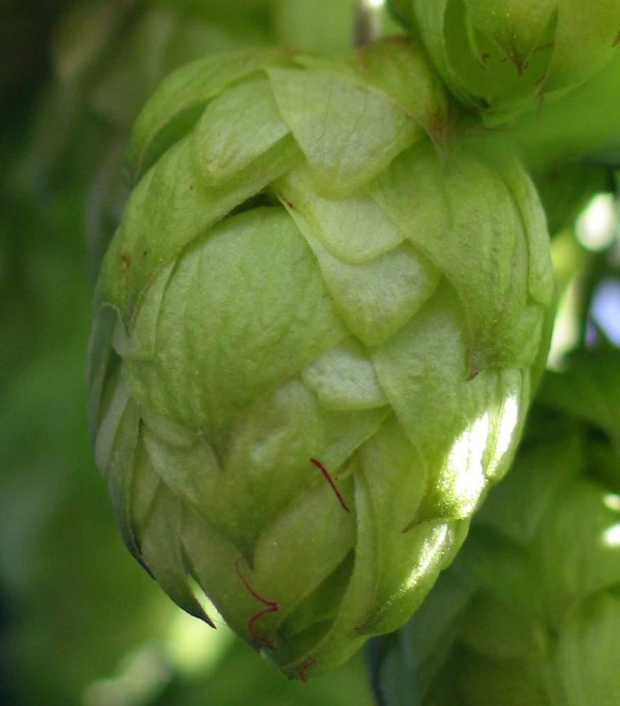 Detailaufnahme einer Hopfenblüte Das Foto entstand im August 2004 in Hamburg. Die Pflanze rankte um ein vor sich hin korrodierendes Brückengeländer.